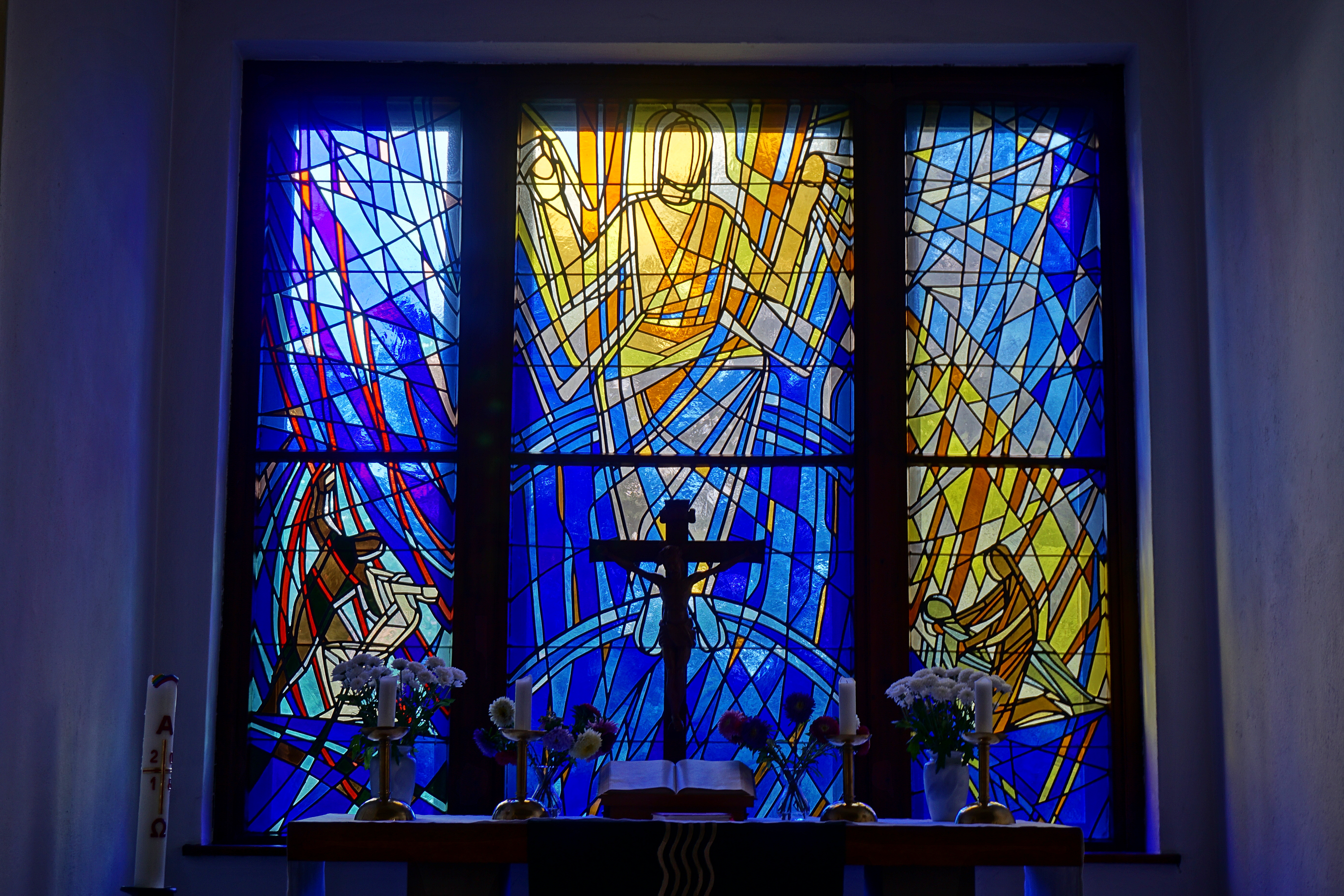 Günter Johl, "Christus als Herrscher über Gut und Böse", Altarfenster in der Kreuzkirche in Magdeburg, 1956. In der Mitte thront Christus, zu seiner Rechten sieht man den Brudermord von Kain an Abel, zu seiner Linken den barmherzigen Samariter.